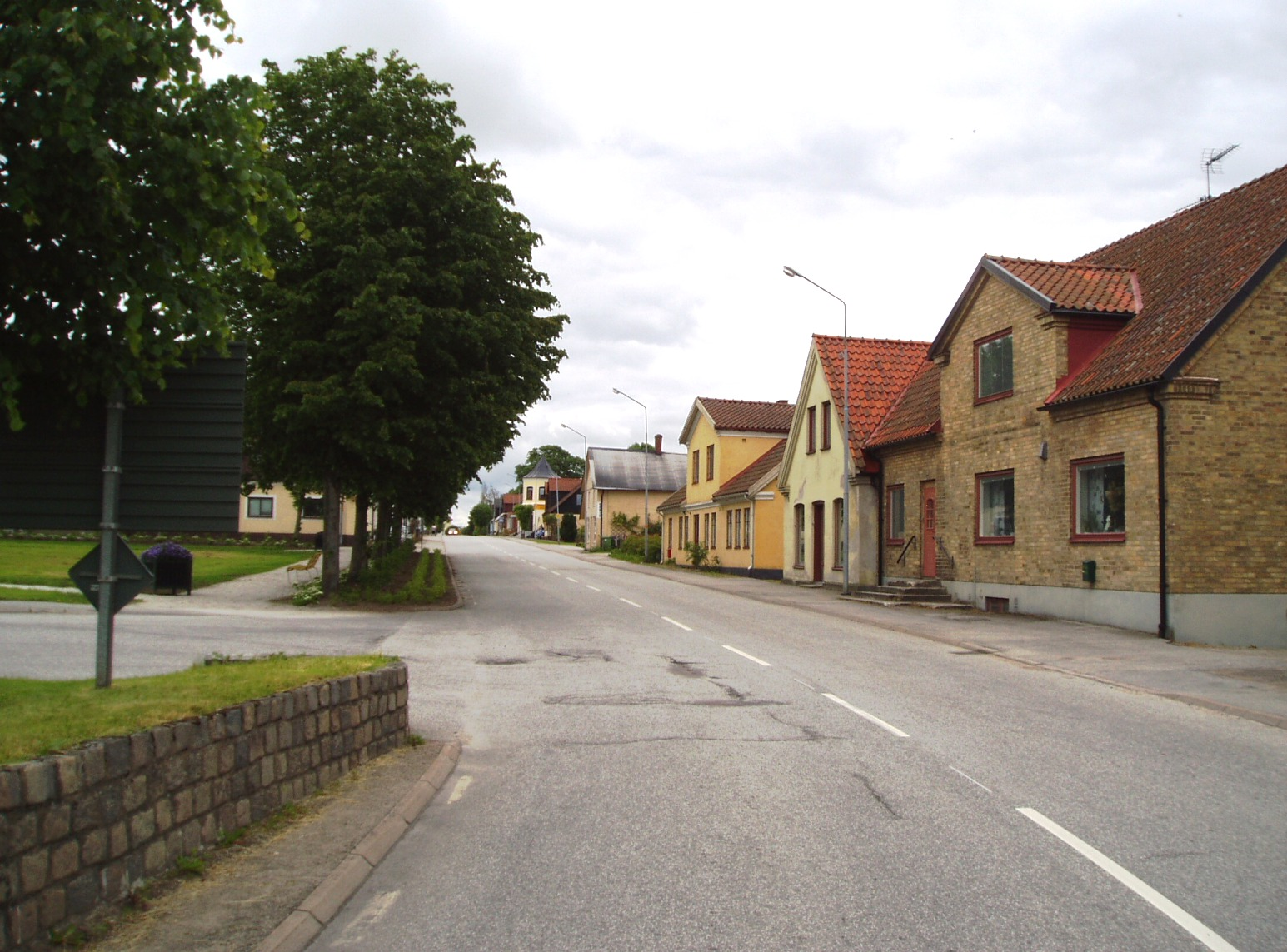 Gata i Löberöd, Eslövs kommun, Skåne